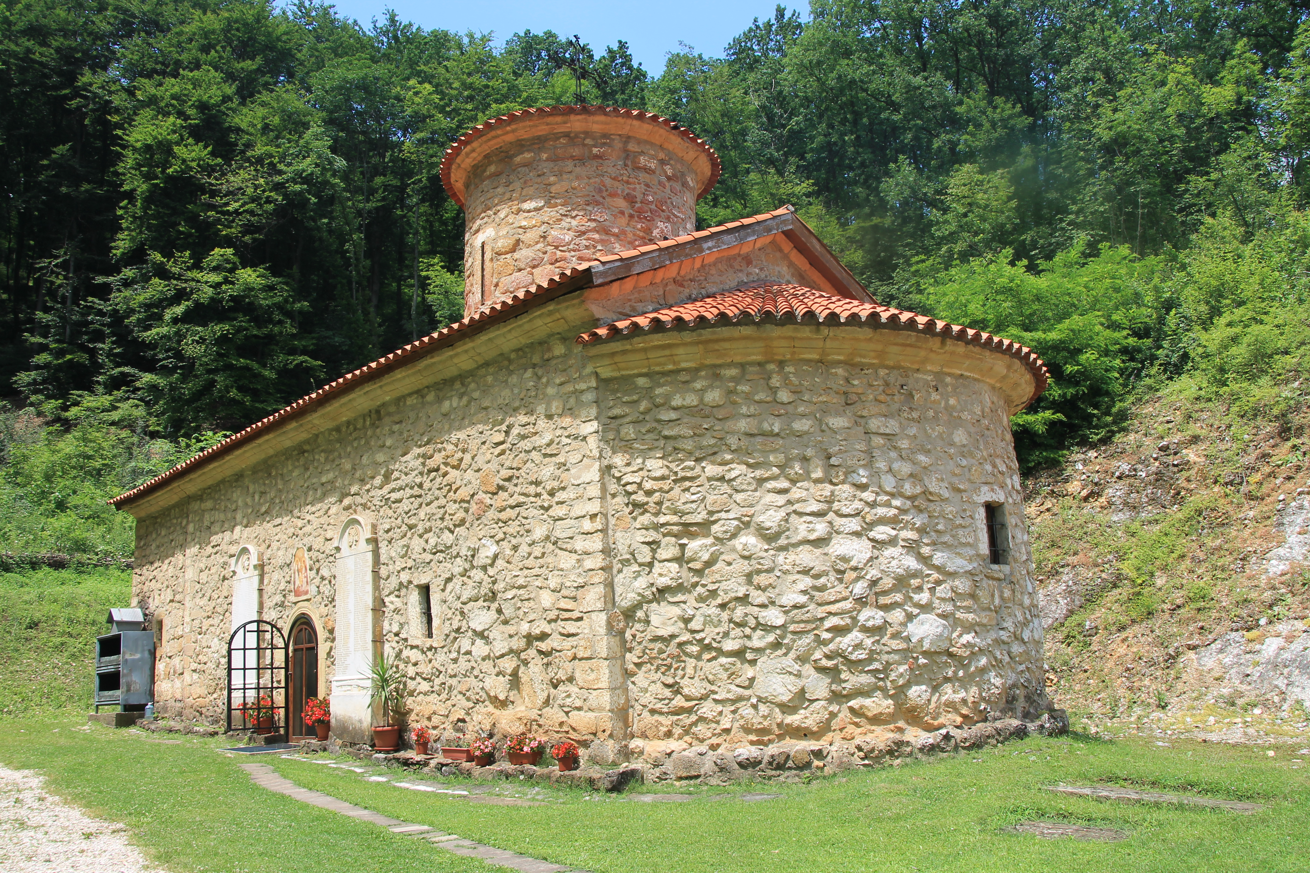 Manastir Trnava